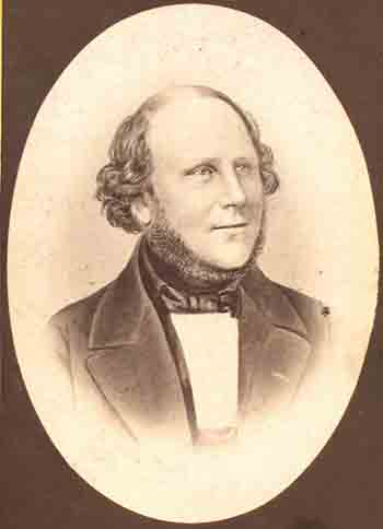 Fotografi af den danske komponist: Emil Horneman. Danish composer Emil Horneman (1809-1870)